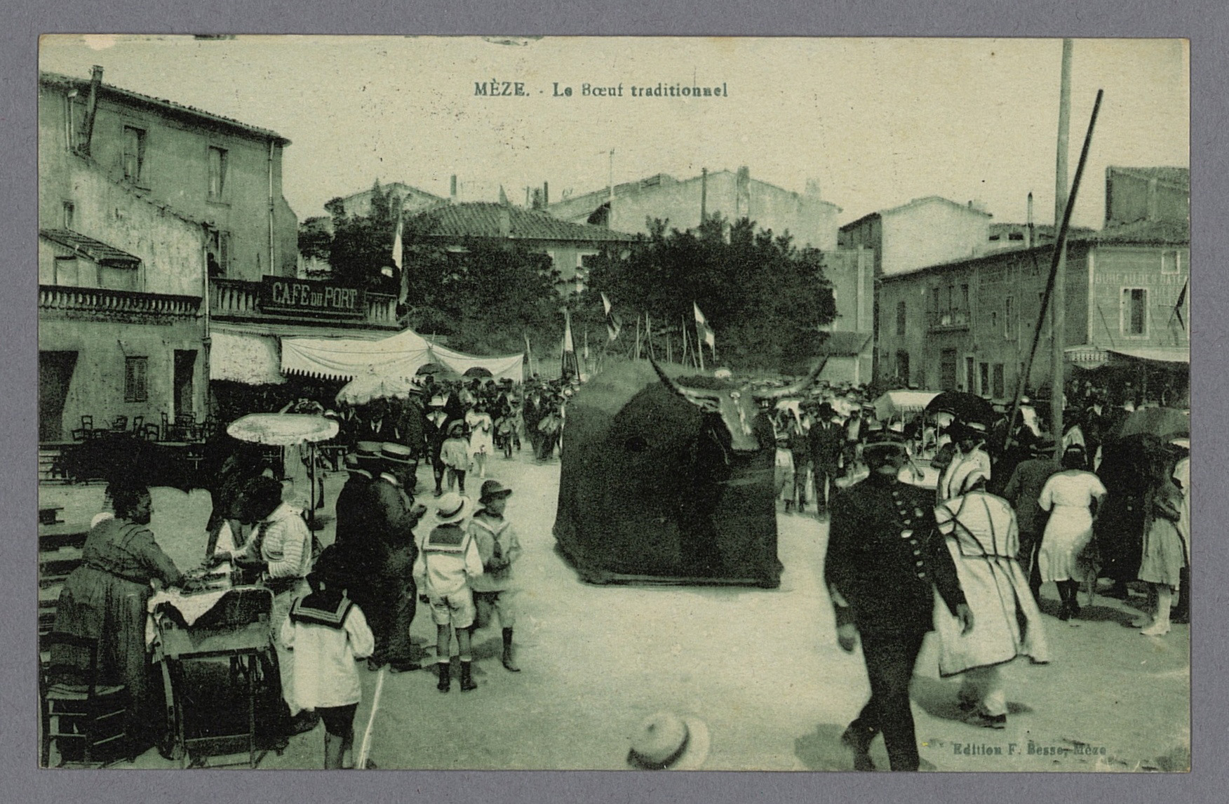 Meze le Boeuf traditionnel - Archives départementales de l’Hérault - FRAD034-50FI-0176-00001